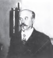 Ludvík Očenášek, konstruktér a vynálezce